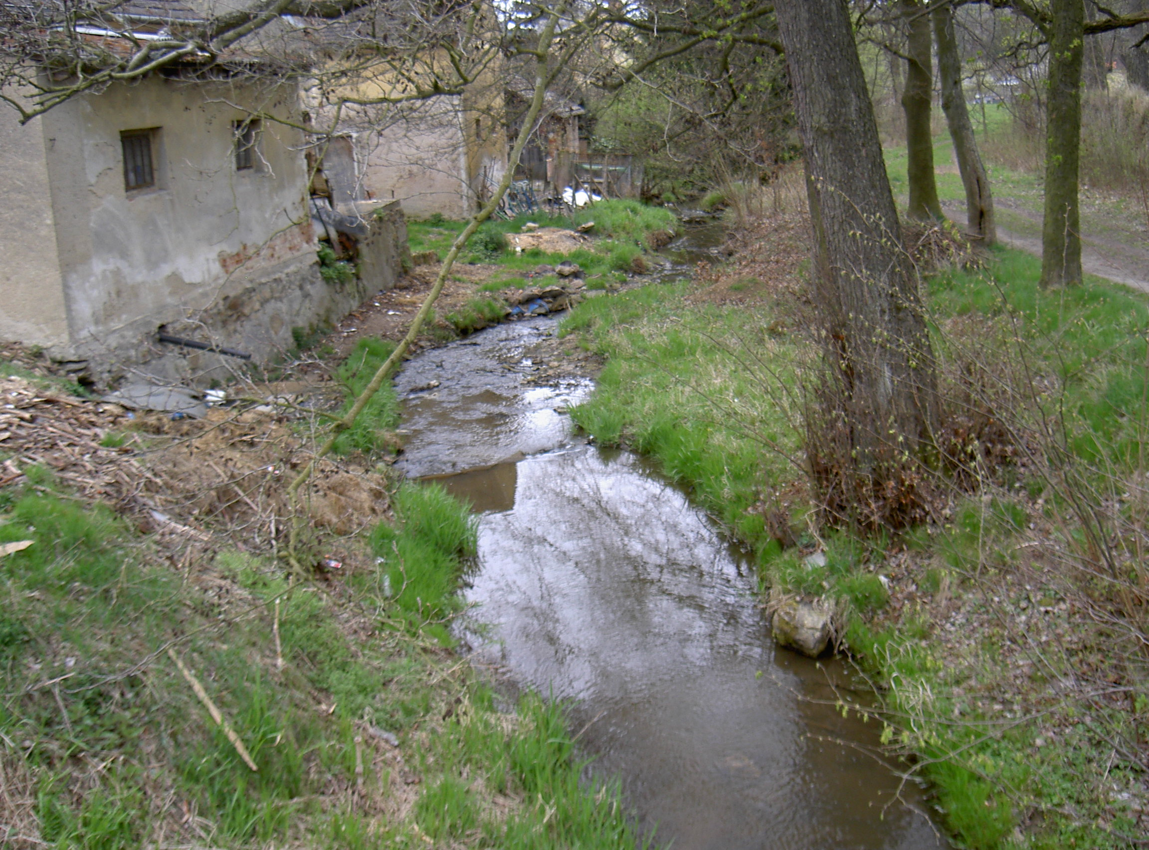 Bystřický potok (Engelbach) bei Újezd Svatého Kříže (Heiligenkreuz)